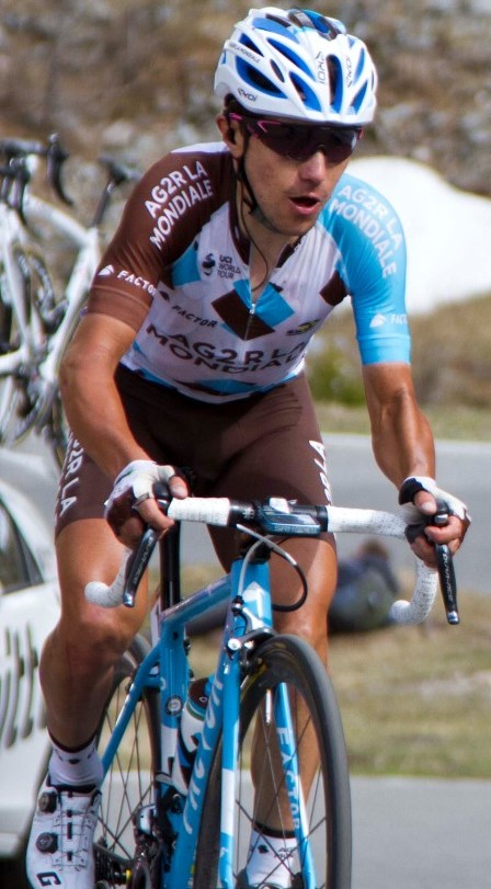 024 nibali pozzovivo